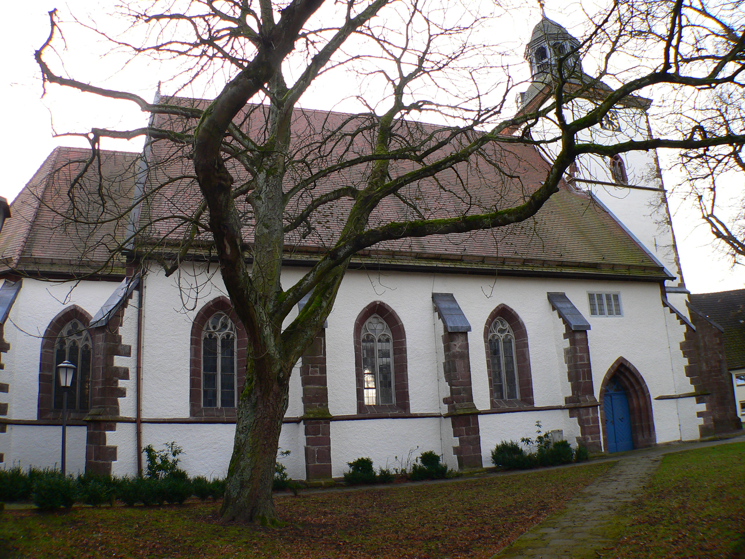 Evangelische Kirche St. Laurentius in Dassel, Niedersachsen, Deutschland - Nordansicht